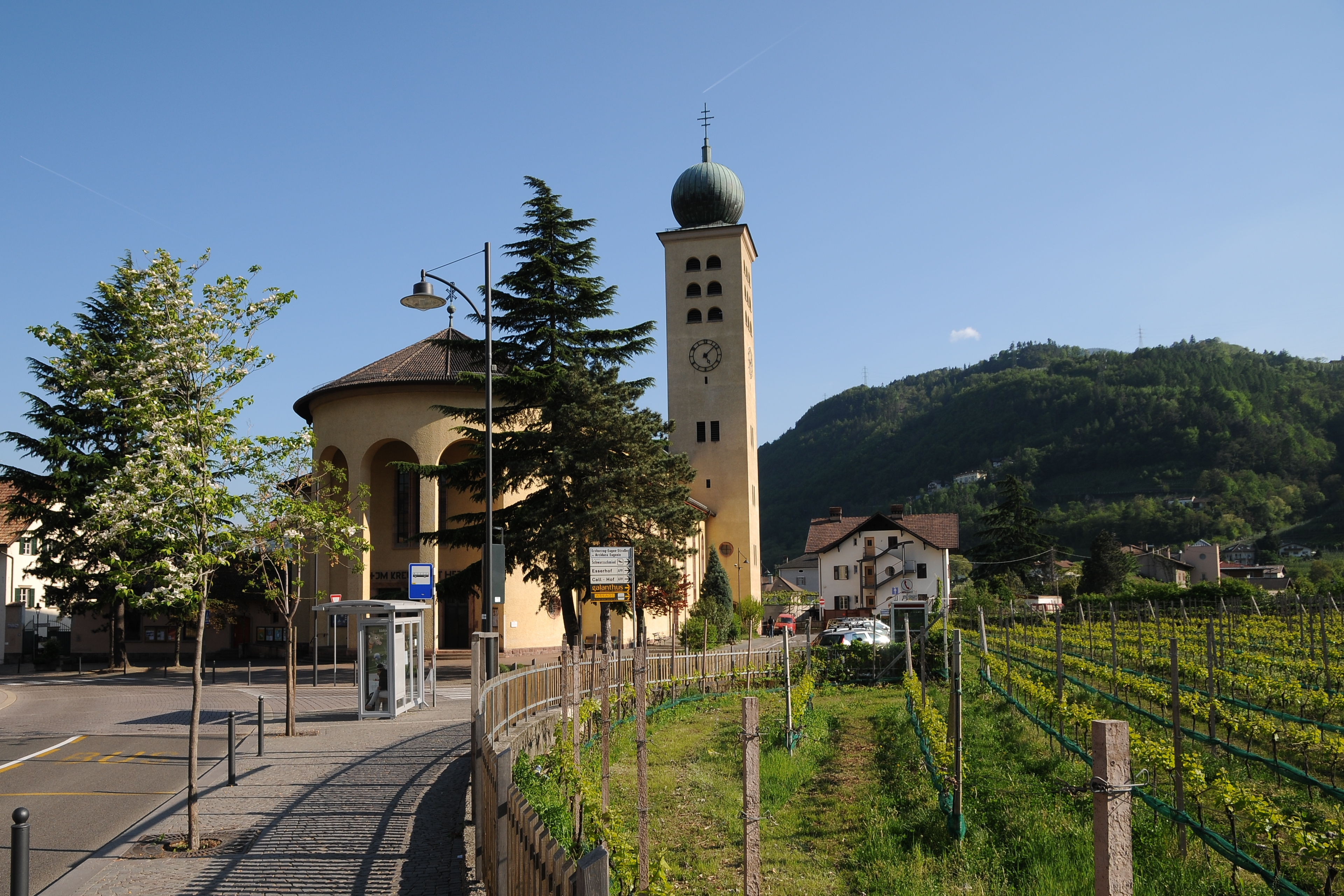 Die Pfarrkirche Hl.Kreuz in Lana wurde nach Plänen von Otto Linder in den Jahren 1938-43 erbaut und 1950 eingeweiht.